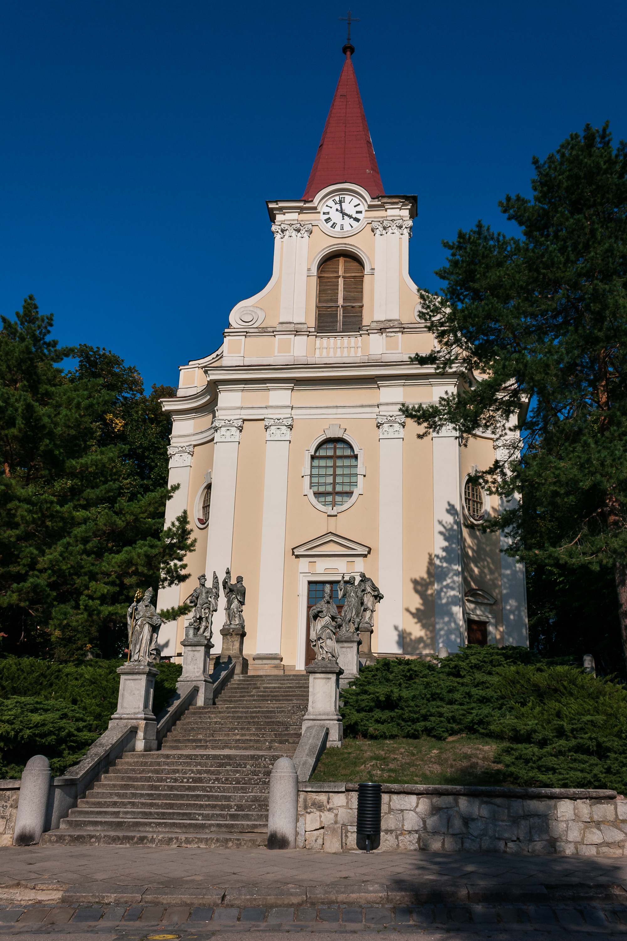 Kostel Povýšení sv. Kříže (Židlochovice), Židlochovice